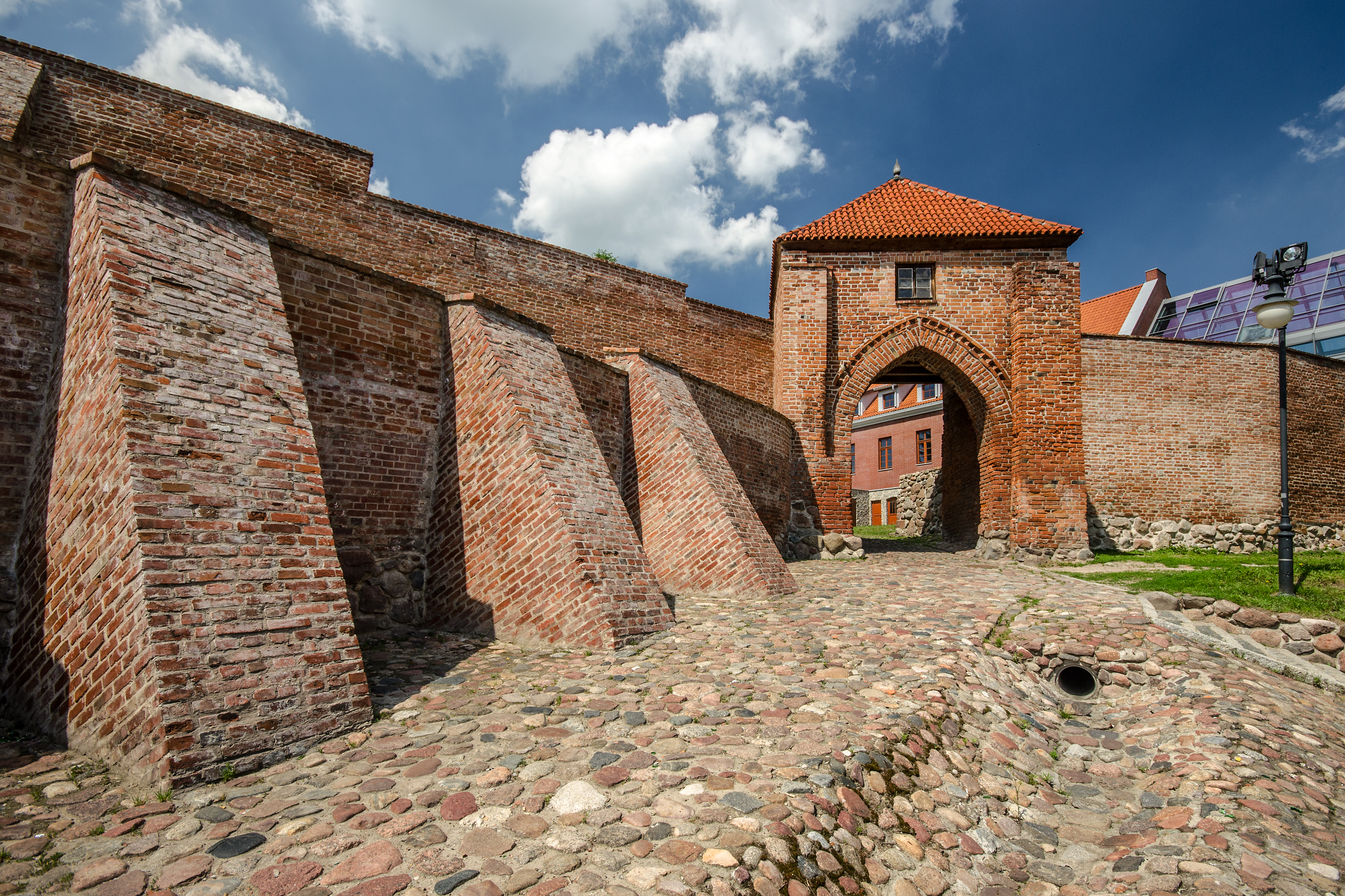 Pasłęk, pozostałości obwarowań miejskich, XIV, XVIII